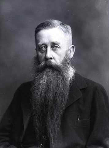 Johan Ludvig Heiberg (184-1928), klassisk filolog, professor, dr.phil.